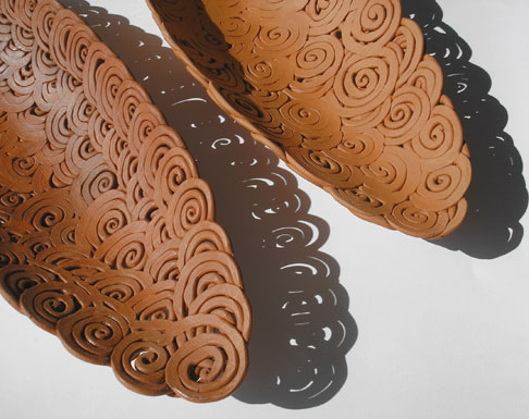 Lidia Boševski: "Lace", 2006. godine, terraccota, 19x53 cm